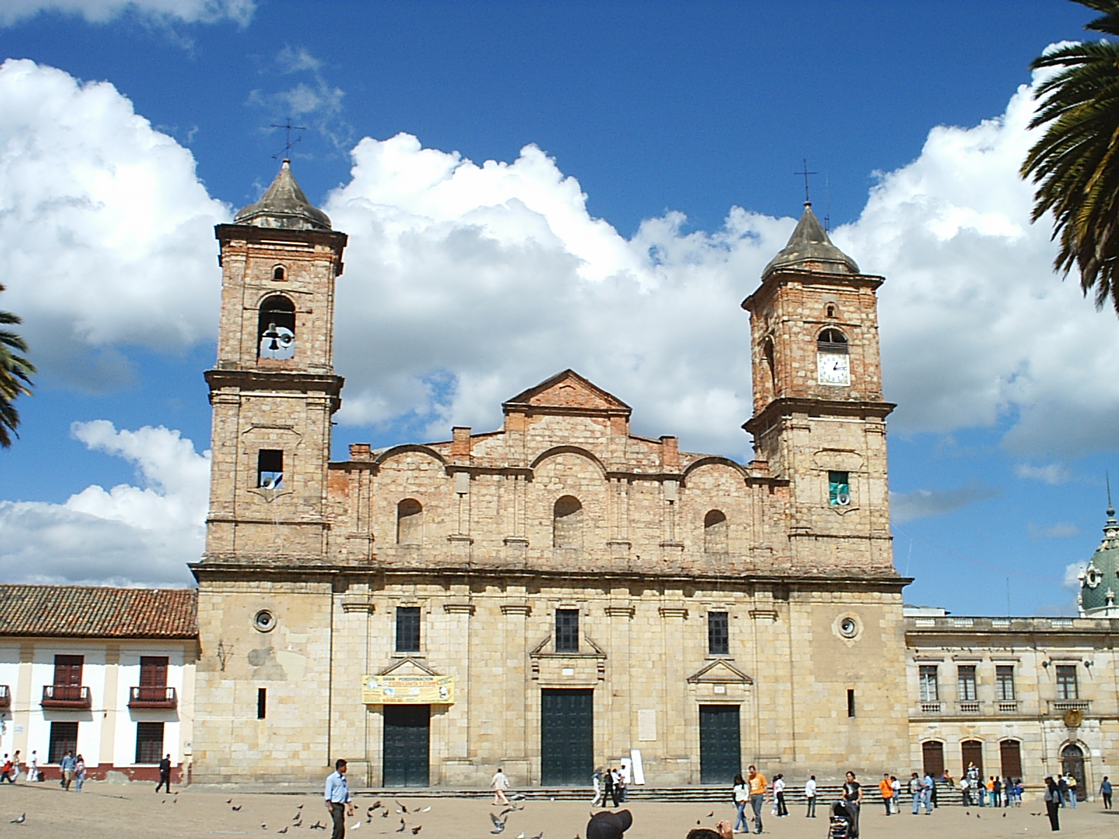 Centro Urbano de Zipaquirá